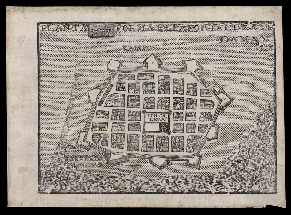 Plantaforma de la Fortaleza de Daman